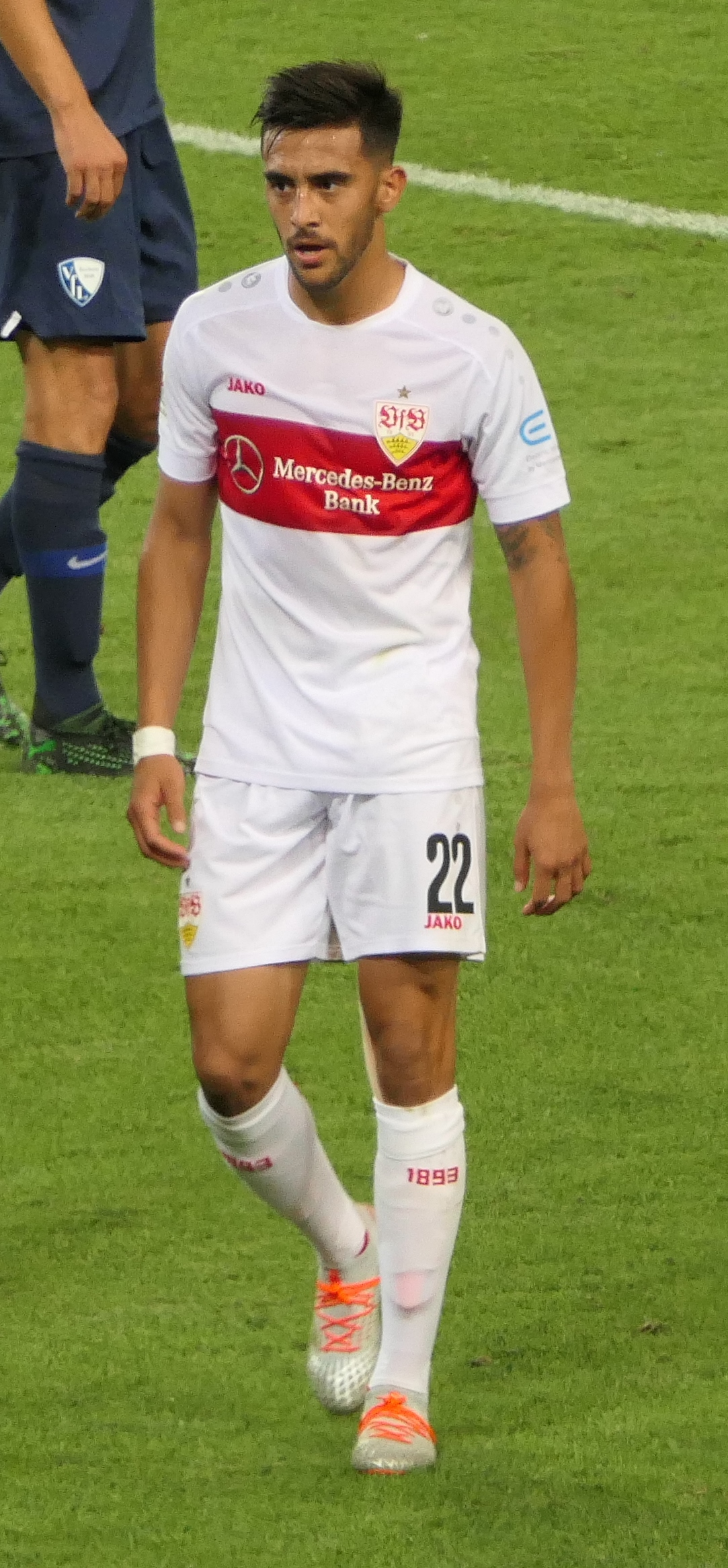 Der Fussballprofi Nicolás González im Trikot vom VfB Stuttgart beim Heimspiel gegen den VfL Bochum am 02.09.2019.